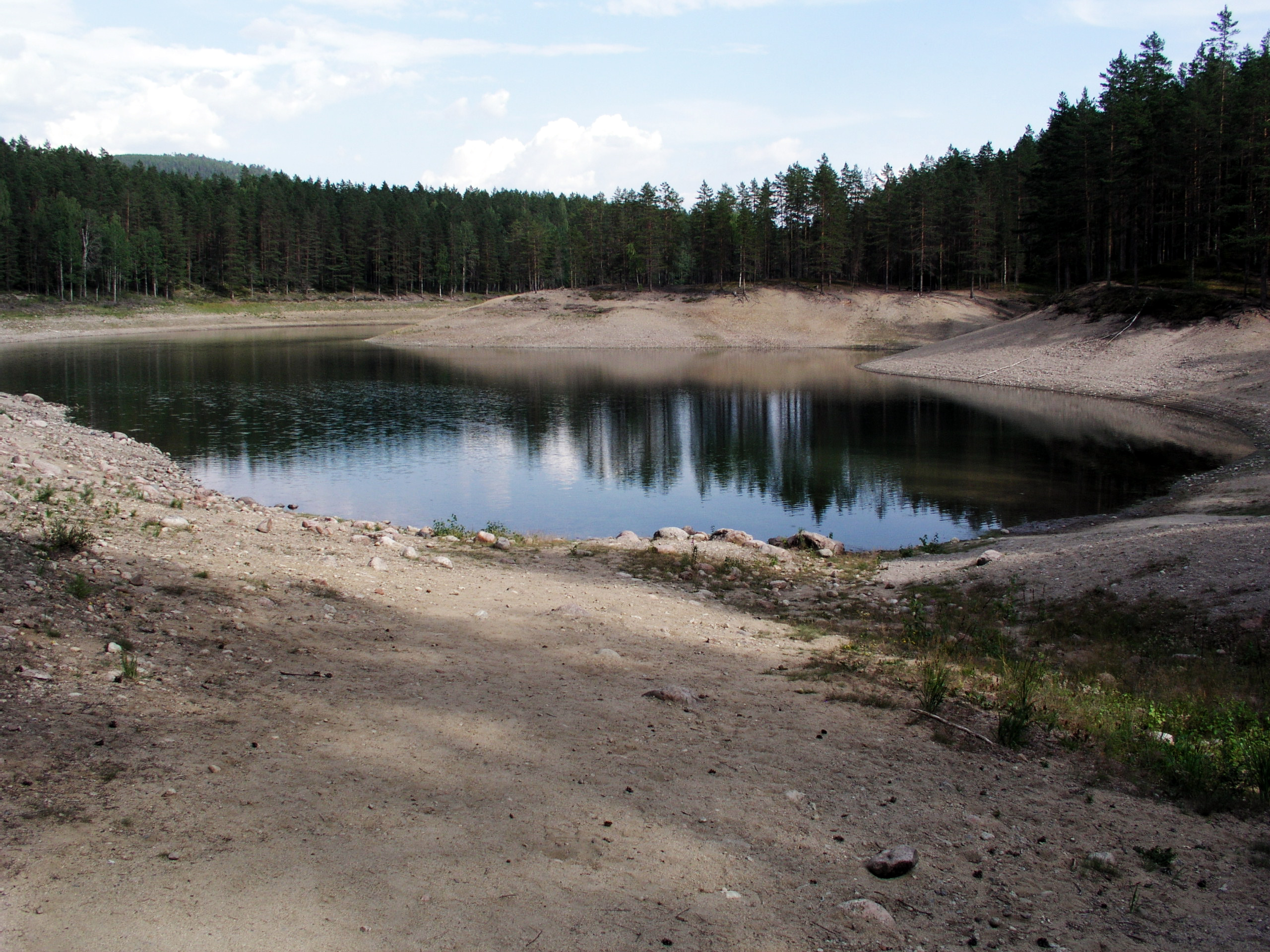 Gröntjärn, cold spring well of water, Ljusdal kommun, Gröntjärn nature reserve